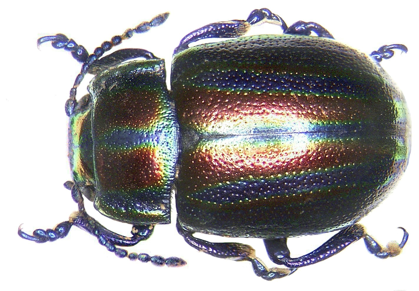 Chrysolina cerealis (Linné, 1767) Familie: Chrysomelidae Grösse: 6-7 mm Verbreitung: Europa Fundort: Germania, Oberfranken, Kulmbach leg.det. U.Schmidt, 1979 Foto: U.Schmidt, 2006